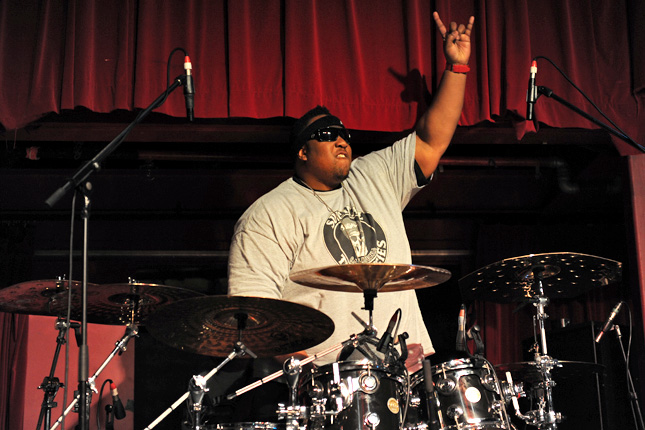 Suicidal Tendencies @ Capitol (18/5/2011)